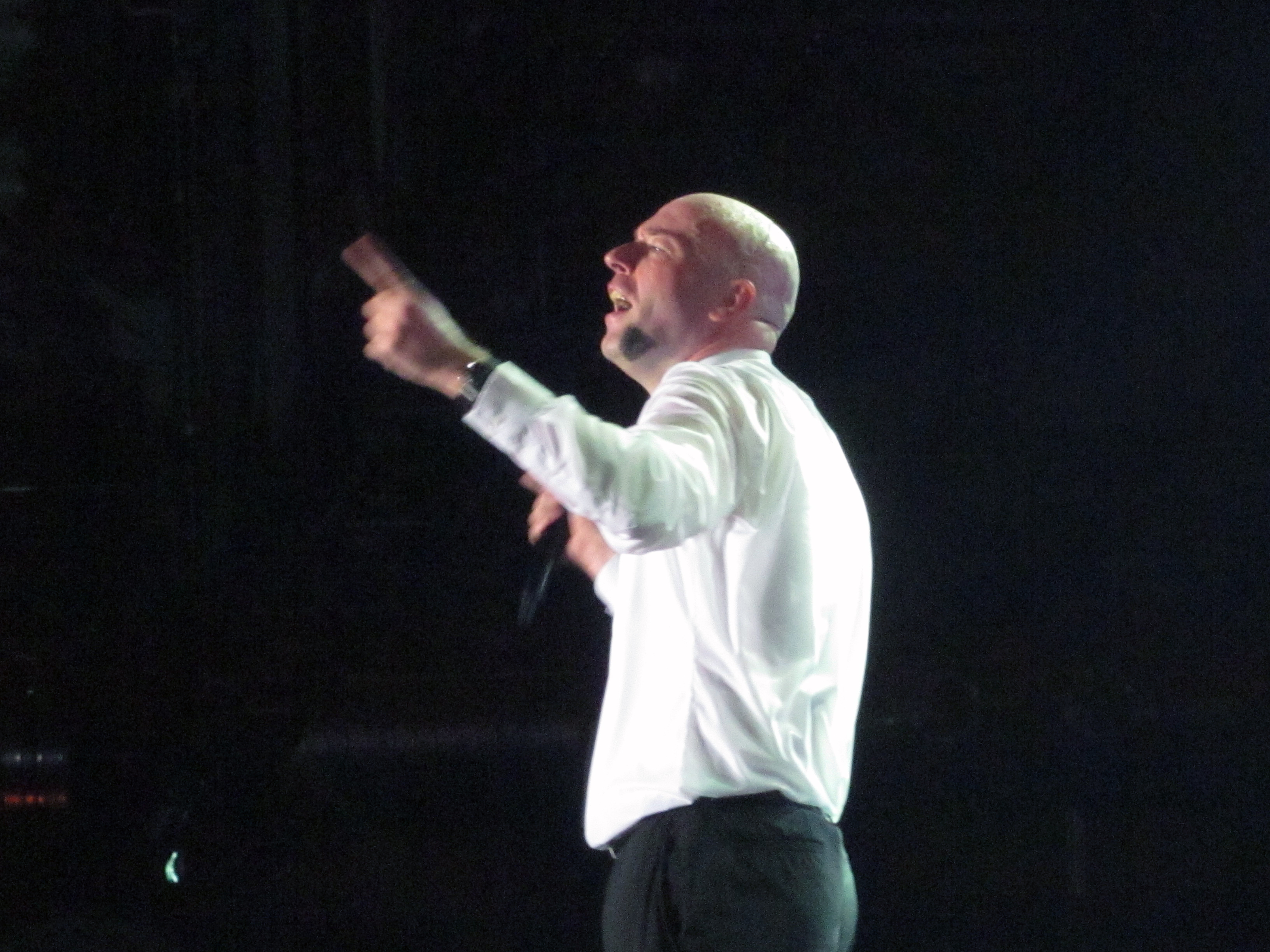 Unheilig - 10 Jahre Tour - Der Graf